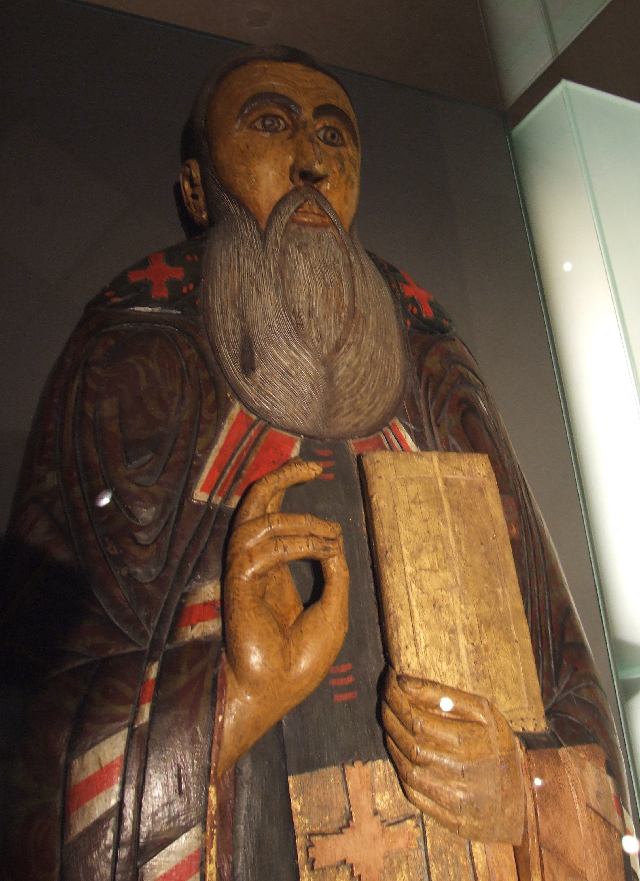 РЕЛЬЕФНАЯ ФИГУРА С КРЫШКИ РАКИ. СВЯТОЙ ИОАНН, АРХИЕПИСКОП НОВГОРОДСКИЙ 1559 год Новгород Дерево; резьба, золочение, темперная роспись XVII века 192 х 56 х 12 Поступила в 1898 году из МАХ Происходит из Софийского собора Великого Новгорода ГРМ инв. ДРД-496